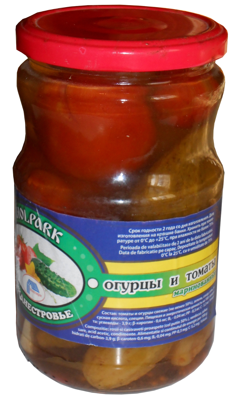 Огурцы и томаты маринованные производства села Парканы (фирма Holpark).